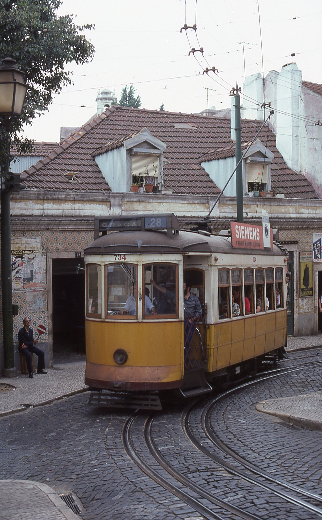 Ligne 28 direction GRACA (cette ligne existe toujours): Rua das Escolas Gerais Tram 734 de la série 701-735, il est parti à Majorque sur la ligne du Porto-Soller, sa caisse a été démolie en 2011, il ne reste plus que son truck avec ses moteurs de réserve. Petite histoire, à gauche assis sur une caisse, un vieux monsieur avec une palette, régulait la circulation, sa fonction voulait être supprimée par la CARRIS, une pétition a été faite auprès de la population est ce vieux monsieur à pu continuer son travail de régulateur de la circulation encore plusieurs années. A ce jour, il y a des feux.